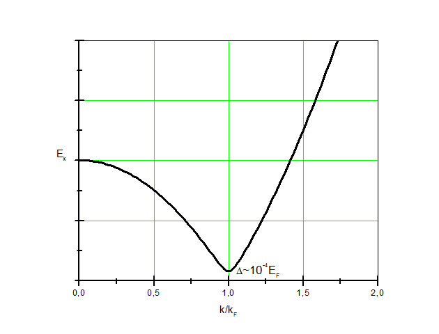 Ek es, en el marco de la teoría BCS, la diferencia de energía entre un sistema en que todos los electrones están en estado superconductor formando pares de Cooper (que sería el estado fundamental), y ese mismo sistema con un único electrón desapareado en el estado k (que es el primer estado excitado). Puede parecer que en principio si un par de Cooper se rompe, deberíamos tener como mínimo dos electrones desapareados; sin embargo si consideramos un sistema que permite intercambio de partículas, la excitación más baja posible corresponde a la de un único electrón desapareado y no dos. k/kF es la razón entre el momento de dicha partícula y el momento de Fermi. Δ es la banda prohibida superconductora, que es la energía mínima que necesita un electrón para pasar al estado normal. Si la que recibe un electrón apareado es inferior a Δ, este no tendrá ninguna posibilidad de pasar al estado normal. La función se ha realizado por aplicación directa de la función que pretende emular, mediante constantes arbitrarias, el comportamiento de donde εk es la energía cinética sobre el nivel de Fermi de una partícula de momento k